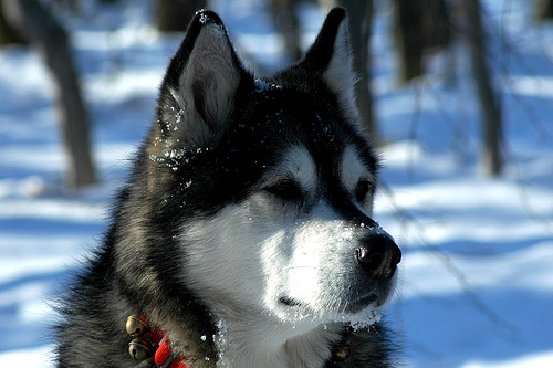 Detalle de un Malamute de Alaska, siempre atento Foto de un Malamute de Alaska. Realizada por Radio Tonreg y compartida en flickr aquí